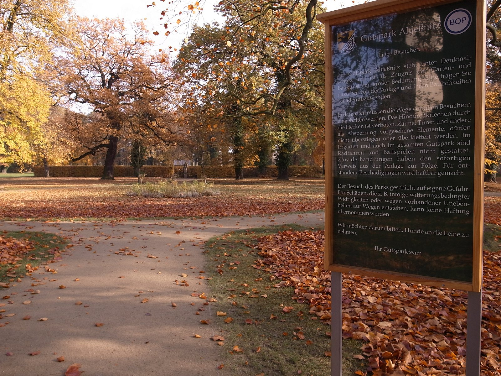 Altjeßnitz,Gutspark mit Irrgarten